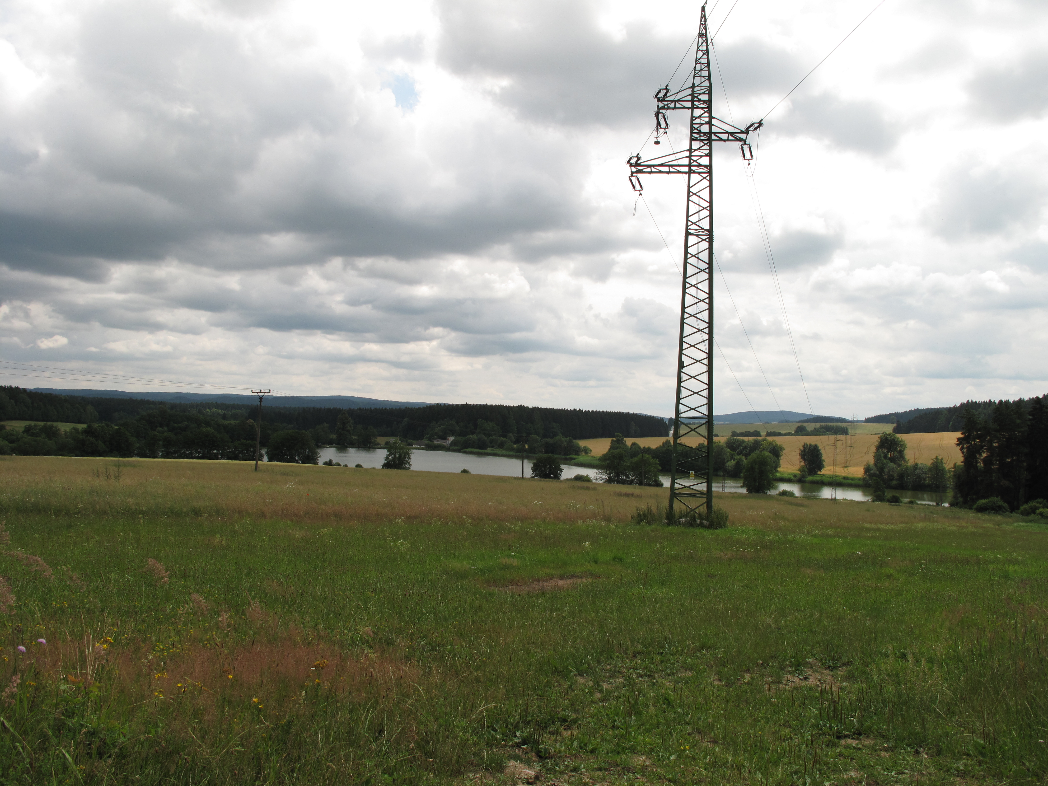 Pohled z dáli na rybník Jistebník. Okres Pelhřimov, Česká republika.